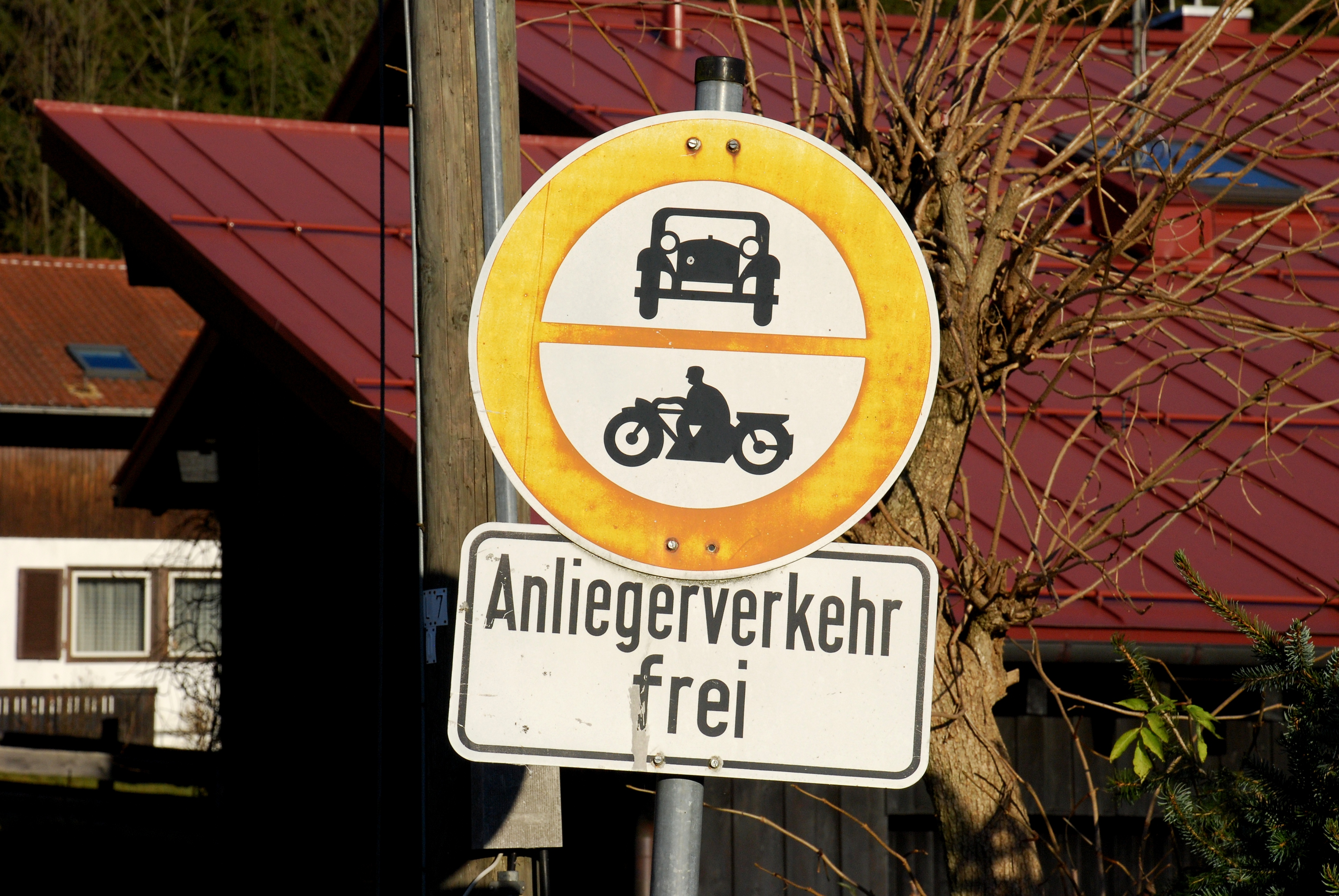 Osterhofen, Gemeinde Bayrischzell, Landkreis Miesbach, Regierungsbezirk Oberbayern, Bayern: Das Verkehrszeichen gibt eine beliebte Kombination aus Bild 13 (Verkehrsverbot für Kraftwagen) und Bild 14 (Verkehrsverbot für Krafträder) der im Mai 1956 gültig gewordenen Novelle der Straßenverkehrsordnung (StVO) von 1937 wieder. Das kombinierte Zeichen selbst besaß keine eigene Nummer. Mit der StVO von 1956 wurde erstmals die weiße Umrandung der Verkehrsschilder eingeführt. Zeichen dieser Art wurden bis 1. März 1971 hergestellt. Damals trat eine neue Neufassung der StVO in Kraft. Das Zusatzzeichen Anliegerverkehr frei schränkt das Verkehrsverbot ein. Es gehört ebenfalls in die Zeit vor 1971.